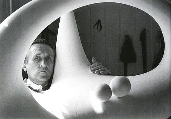 Vèneto: Alberto Viani con Scultura